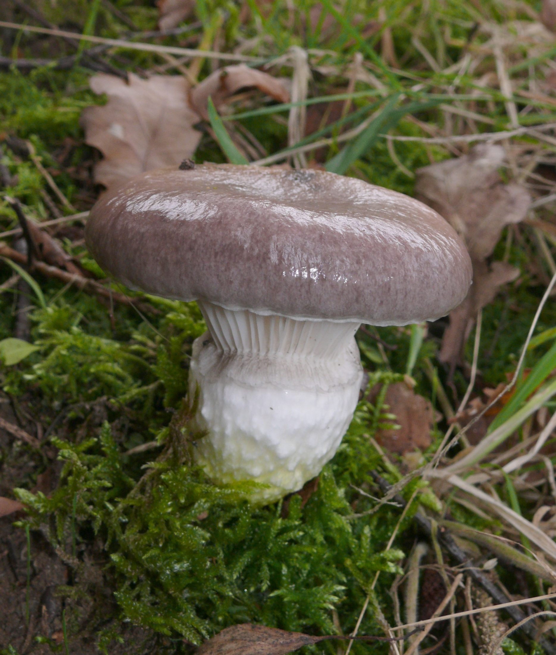 Gomphidius glutinosus, Schwäbisch-Fränkische Waldberge, Germany